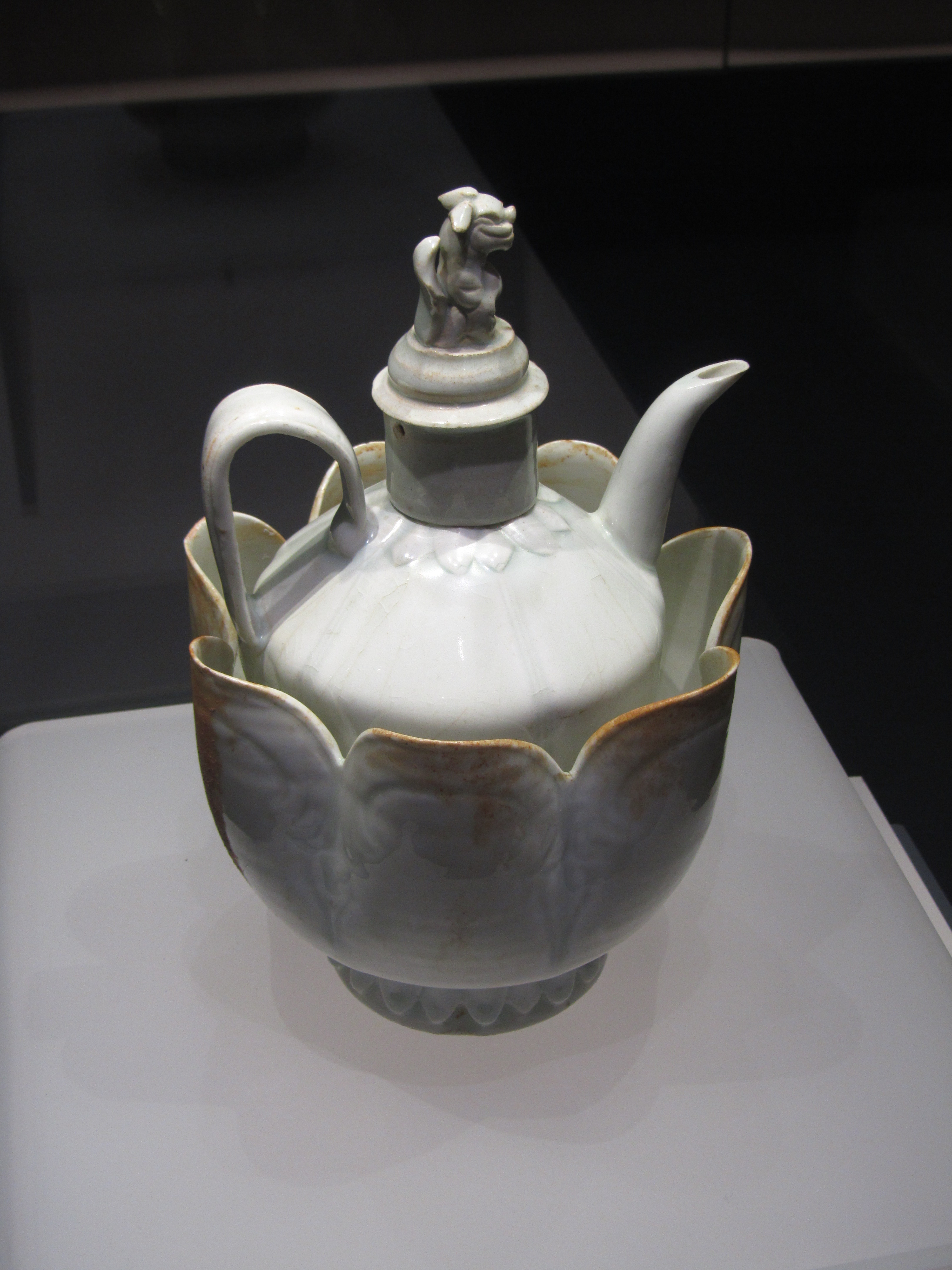 北宋景德镇窑影青釉注子注碗，1964年宿松县北宋元祐二年（1087年）墓出土，安徽博物院藏。